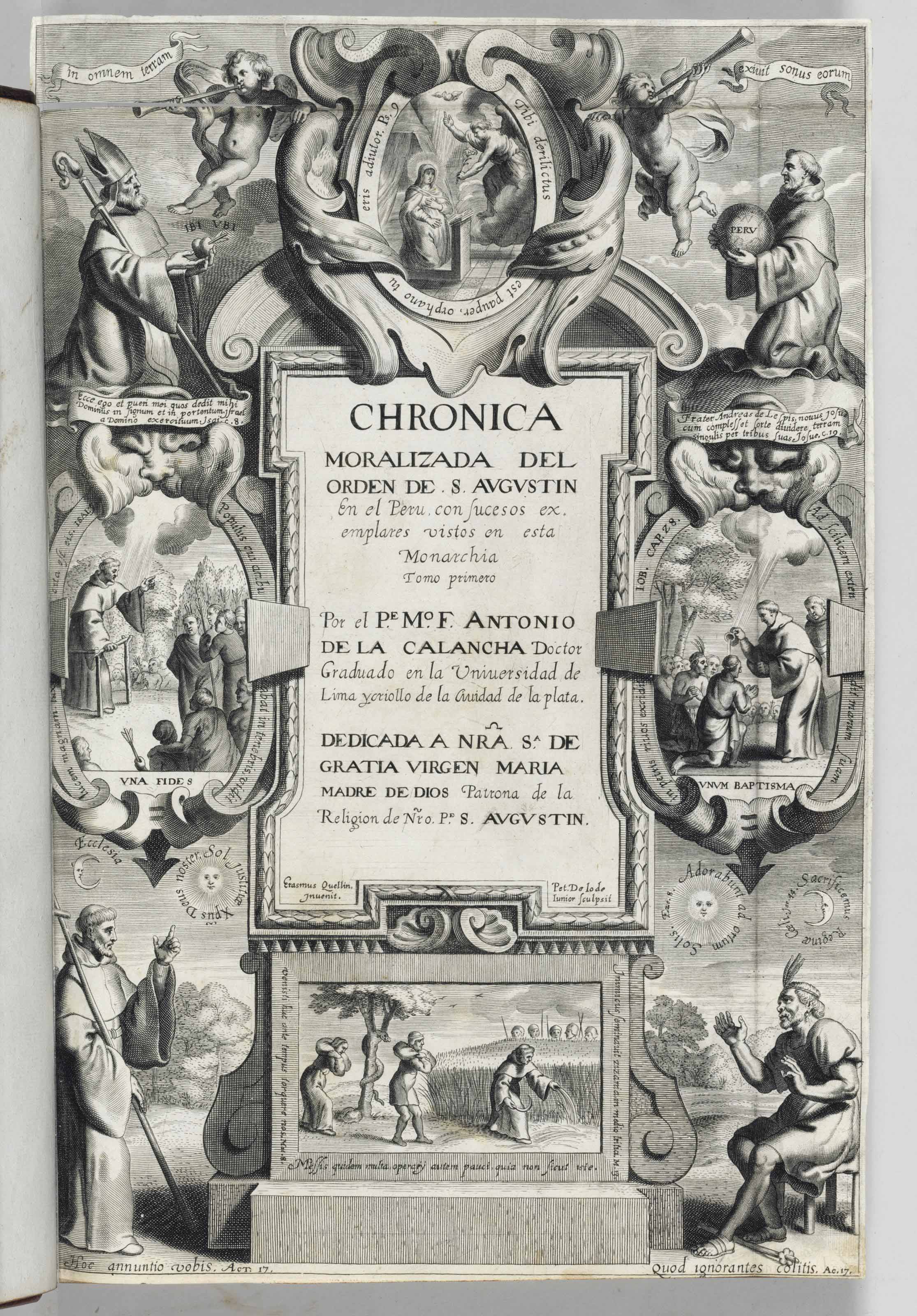 Cronica moralizada del Orden de San Agustin en el Peru, con sucesos egenplares [sic] en esta monarquia . Barcelona: Pedro Lacavalleria, 1638.